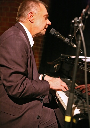 Max Neissendorfer